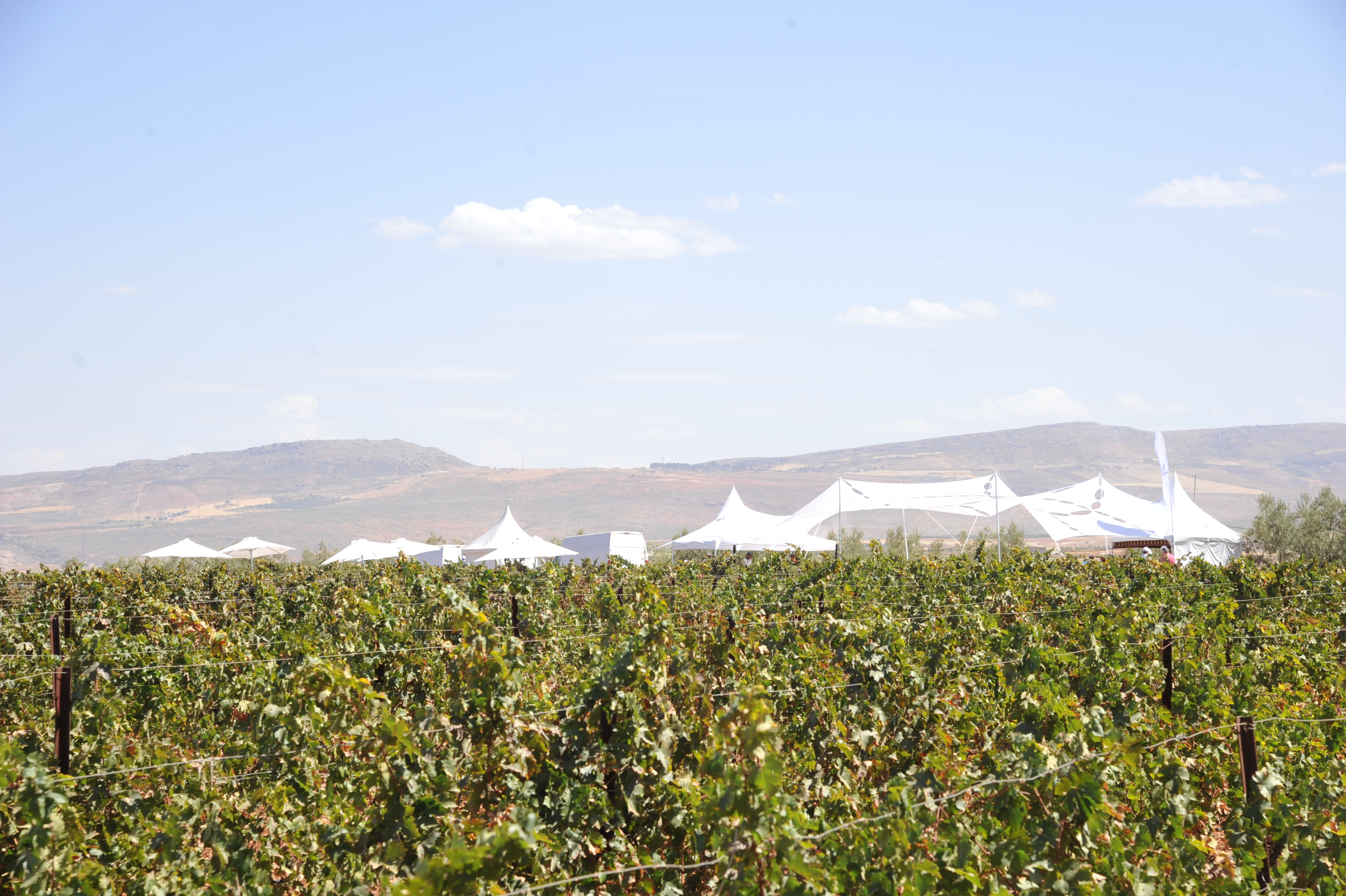 Les premières côtes du Moyen Atlas (vue du Domaine de la Zouina)